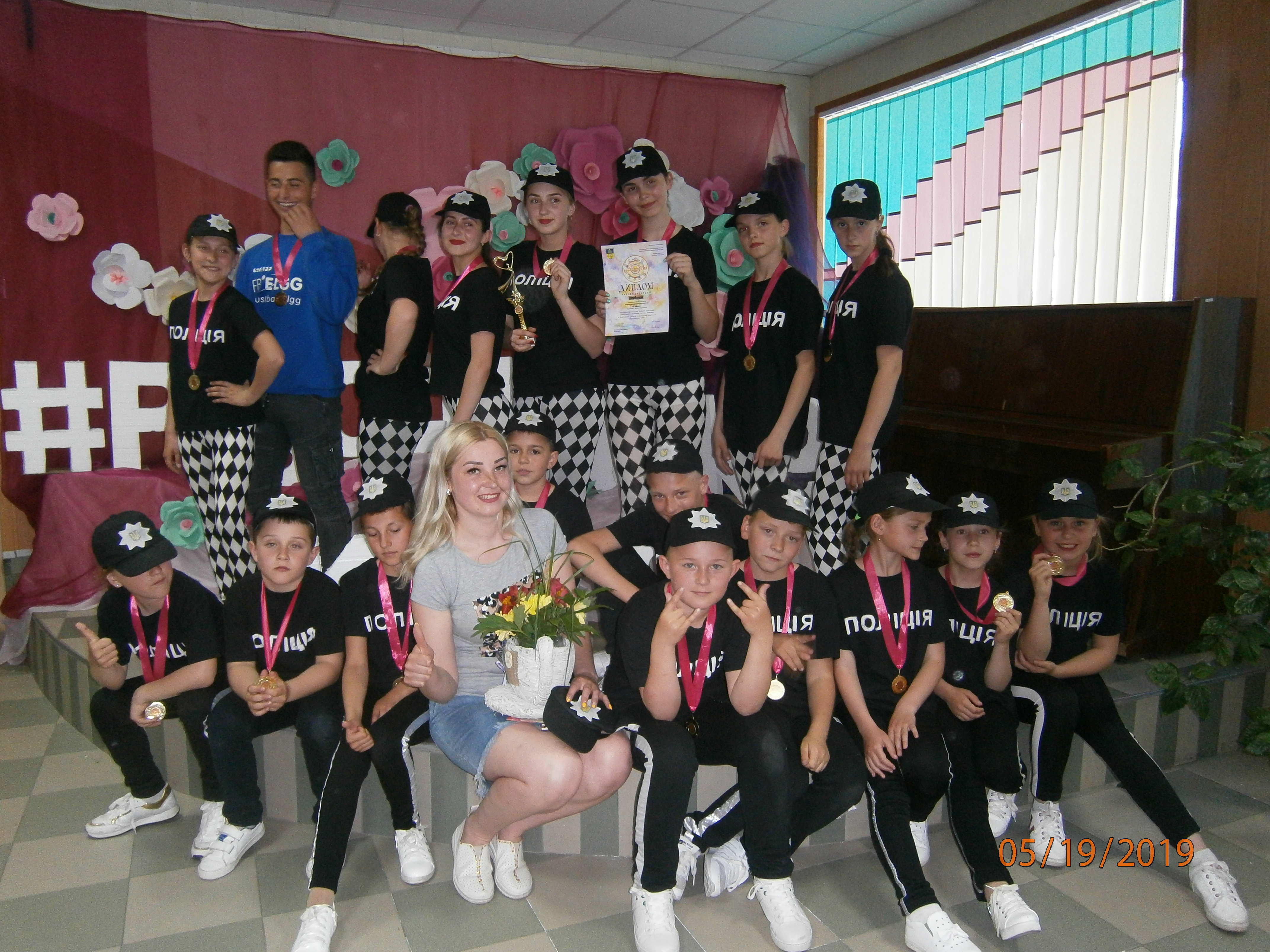 Аматорський хореографічний колектив "Сяйво". Участь у фестивалі "Пісочинське коло"